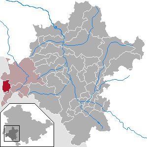 Oberweid in Thuringia - District Schmalkalden-Meiningen